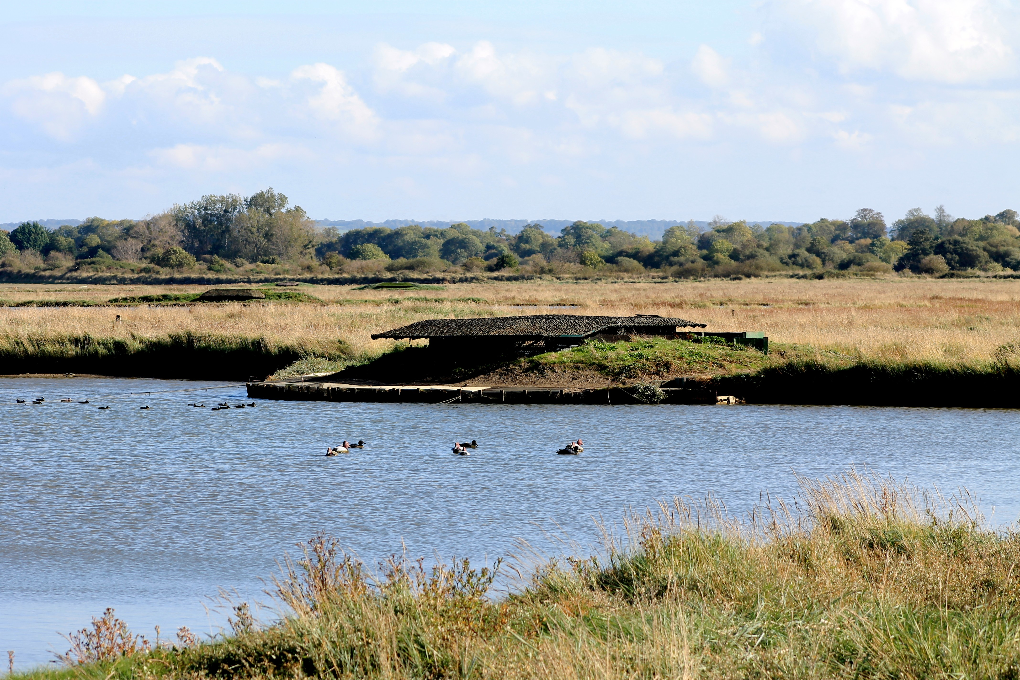 Gabion de chasseurs à l'embouchure de l'Orne à Sallenelles (Calvados)